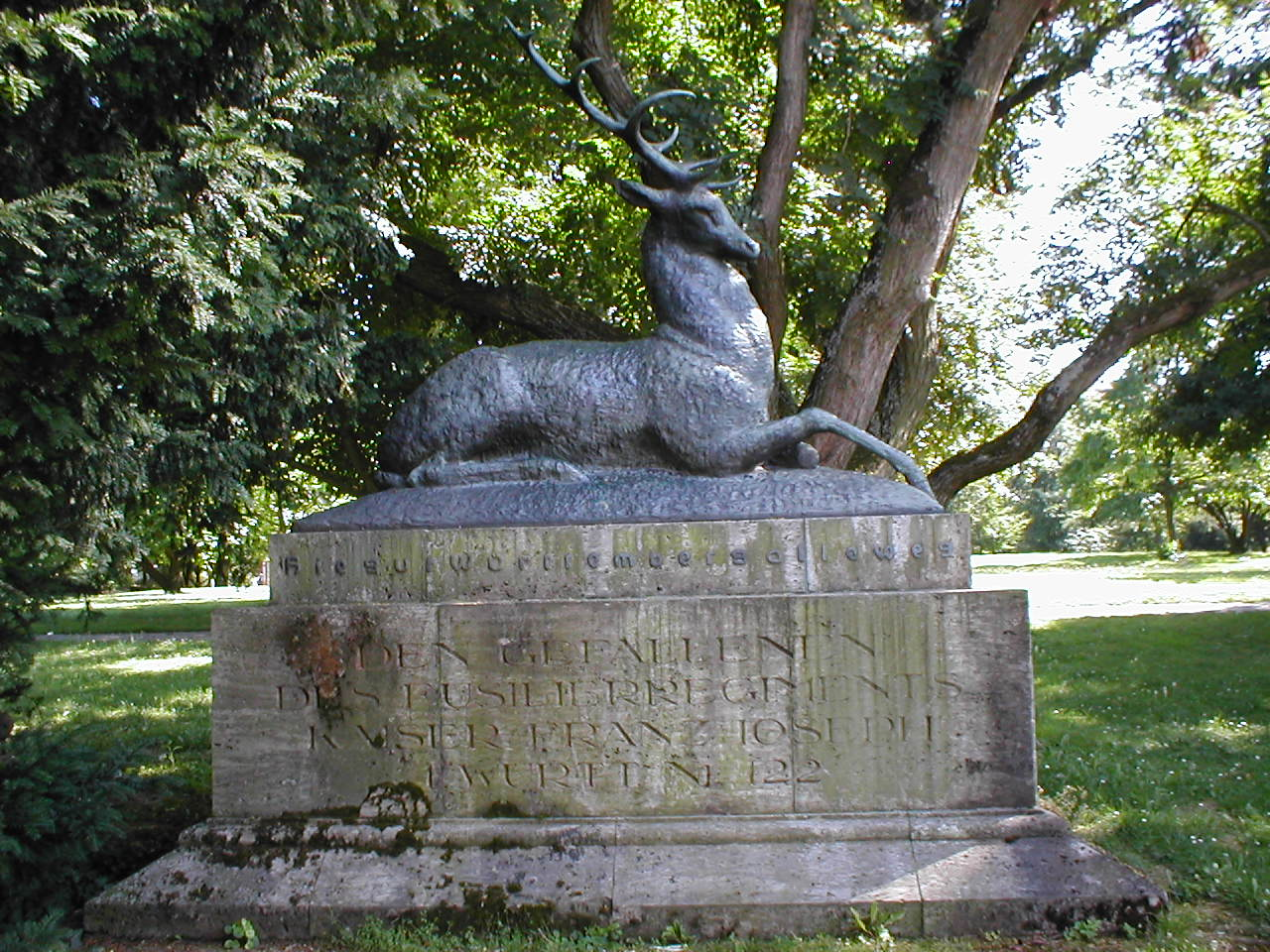 Gedenkplastik für die Gefallenen des Füsilier-Regiments Kaiser Franz Joseph, 4. Württ. Nr. 122, in Heilbronn. Inschrift: "Hie gut Württemberg alleweg"